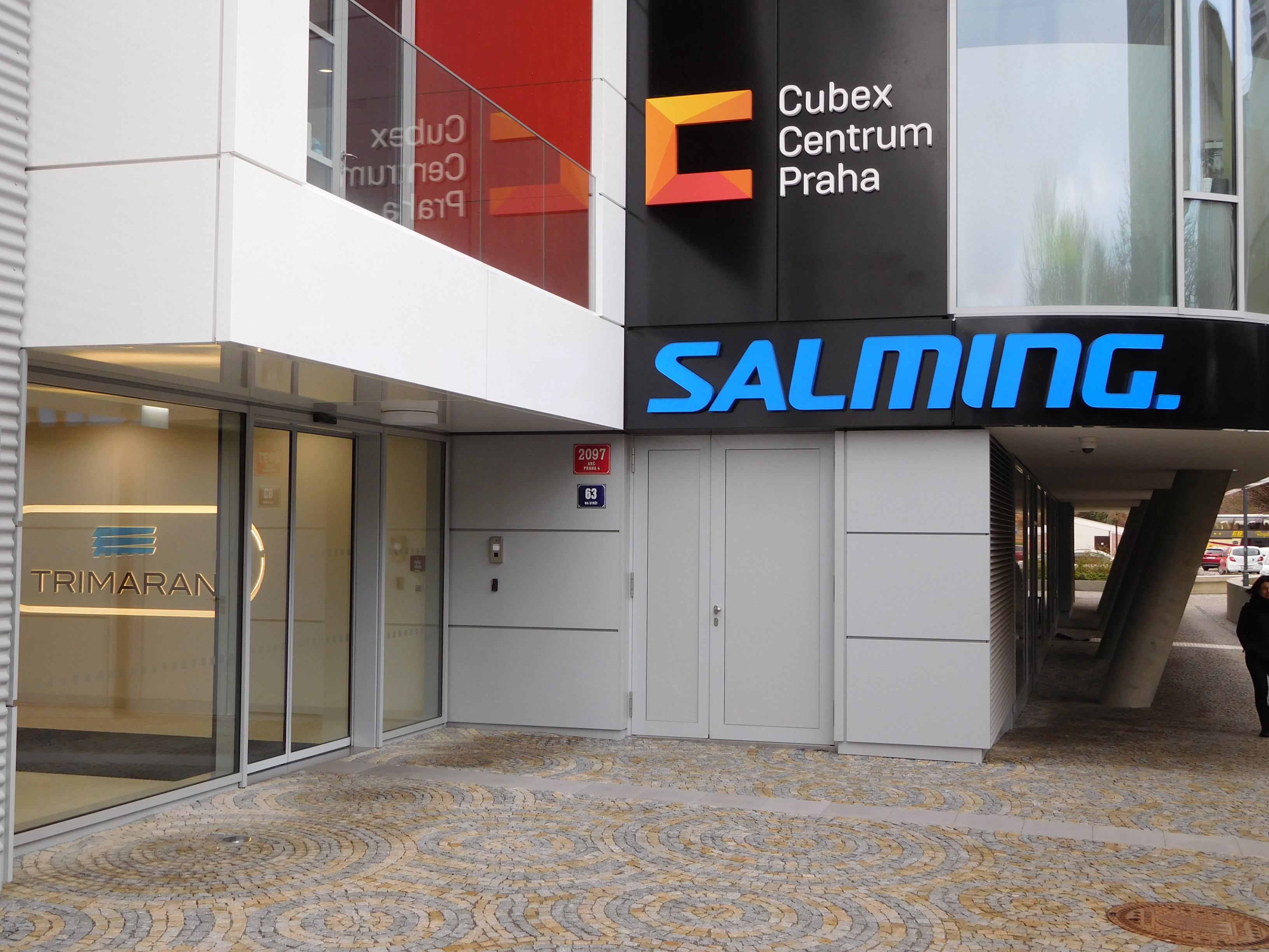 Praha - Pankrác, Na Strži 63 (Trimaran) - Salming & Cubex Centrum